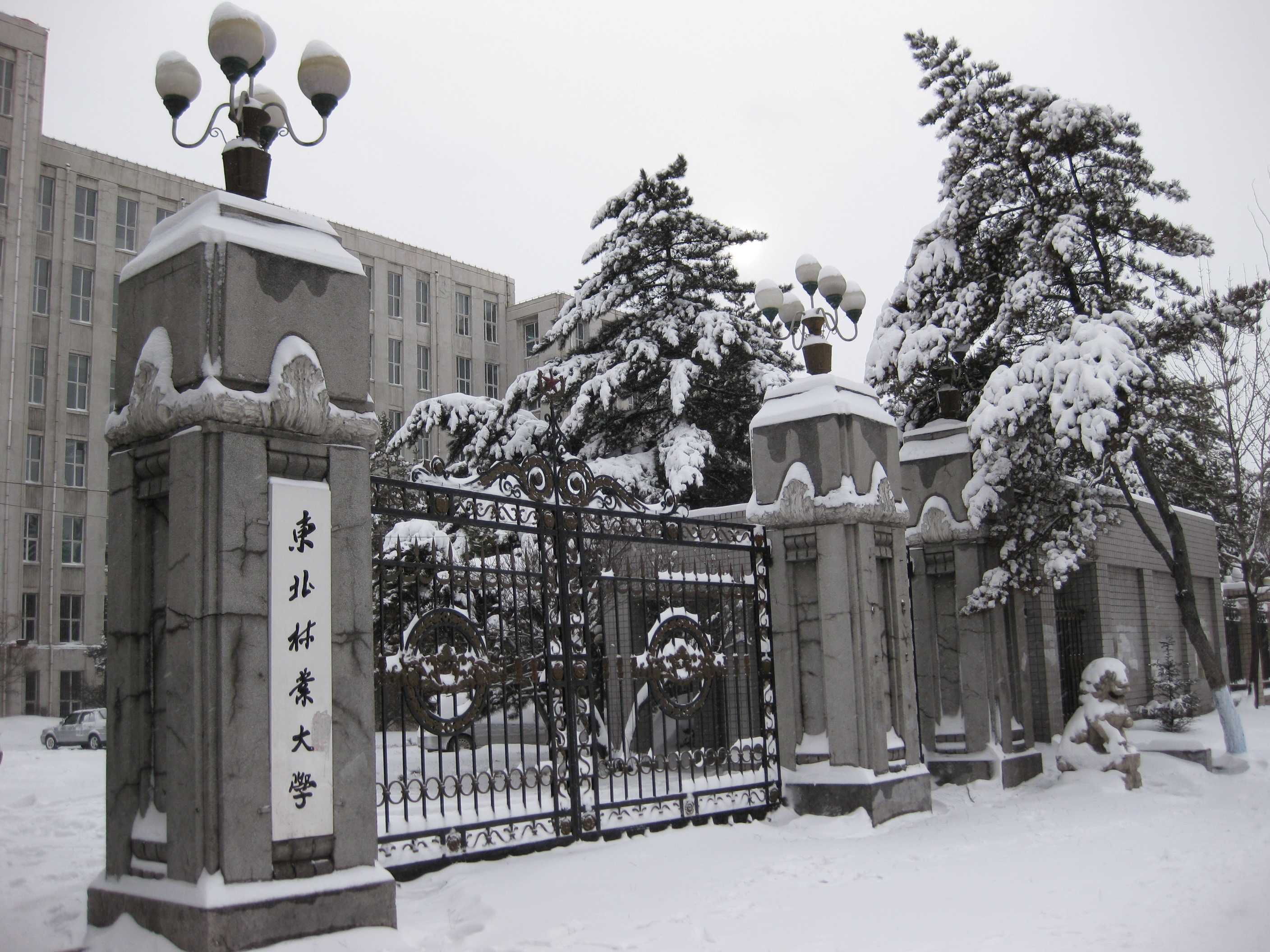 东北林业大学正门